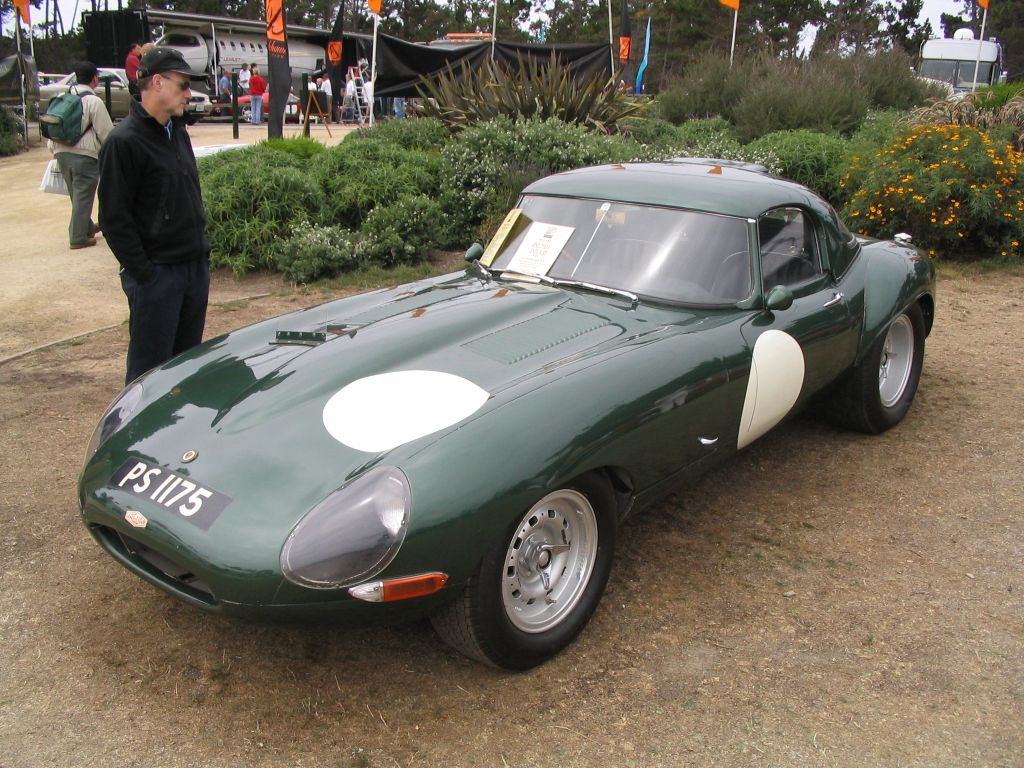 Jaguar E-Type 1963 Jaguar E-Type Baujahr 1963, fotografiert von Ramgeis in Pebble Beach, Kalifornien im August 2004, GNU-FDL